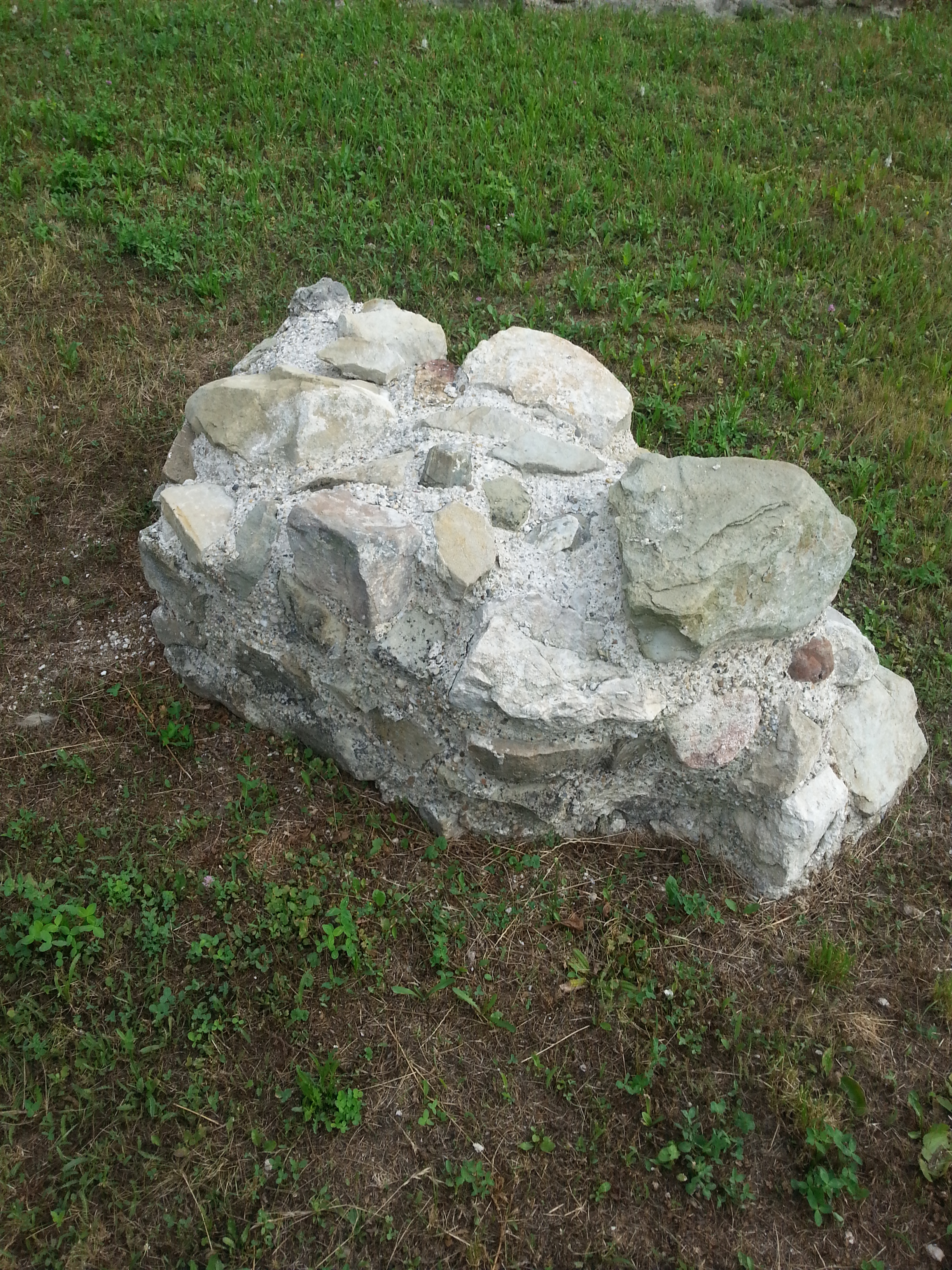 Burgus Zeiselmauer (Niederösterreich) 2018, Mauerrest des NW-Fächerturms.